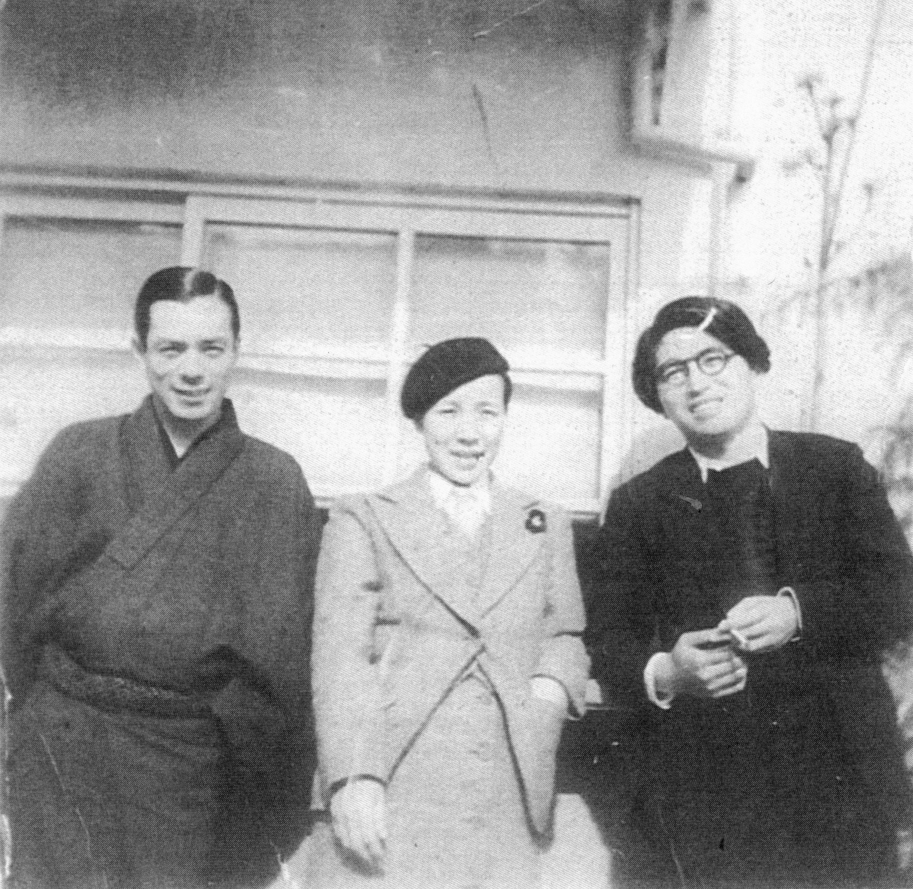 From left to right, Shin Takehisa, Tazuko Sakane and Tōkichi Ishimoto at Daiichi Eiga - Circa 1936